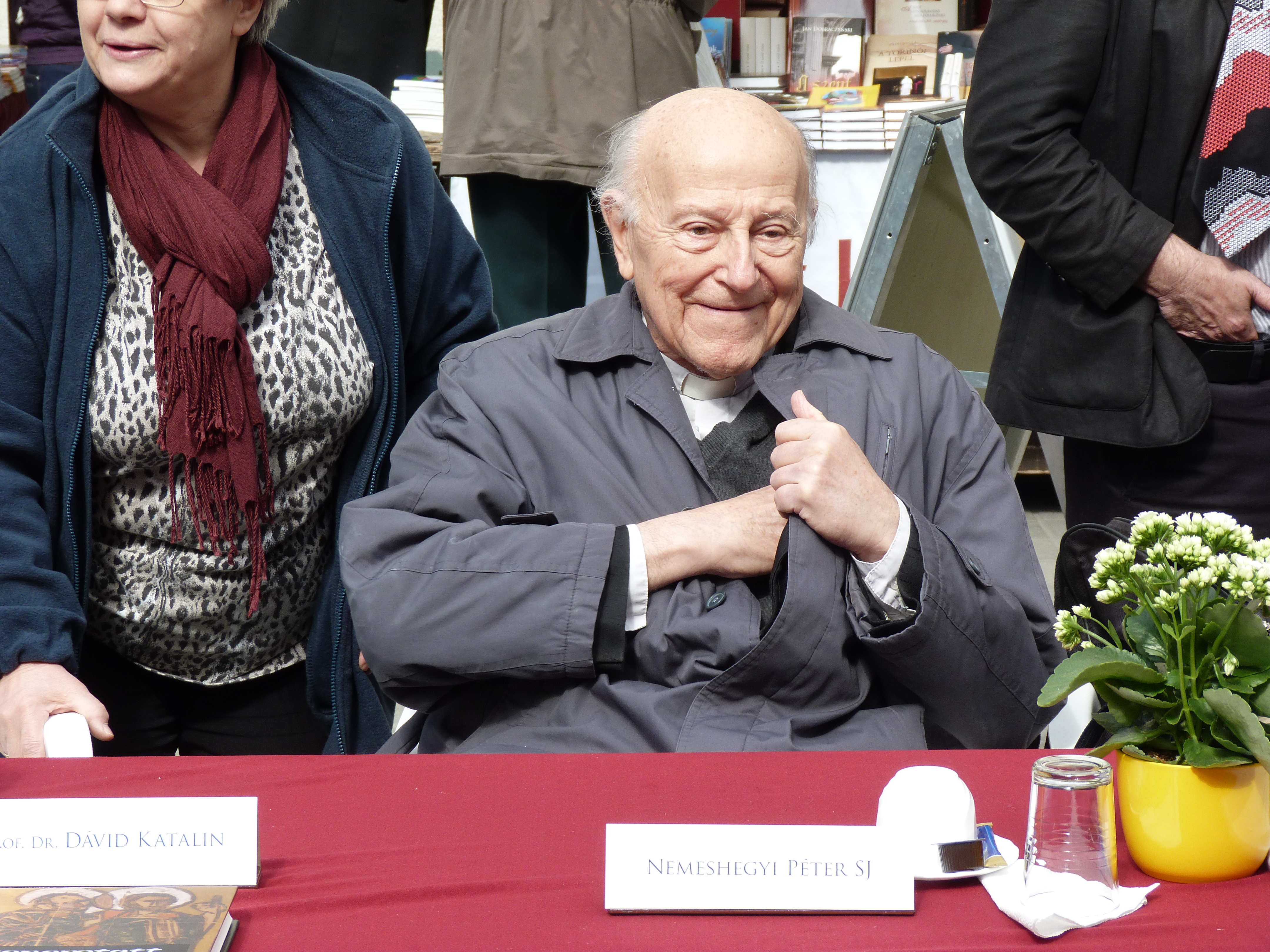 A felvétel 2012. május 17 –én, csütörtökön készült Budapesten, a Ferenciek terén (1-21). A XX. Szent István Könyvhetet 20. alkalommal rendezték meg. Bolberitz Pál, Frivaldszky János (PPKE), Nemeshegyi Péter. Forrás: Szent István Könyvhét huszadszor Metropol. A felvétel megjelent Creative Commons alatt a Metapolisz DVD sorozatban.